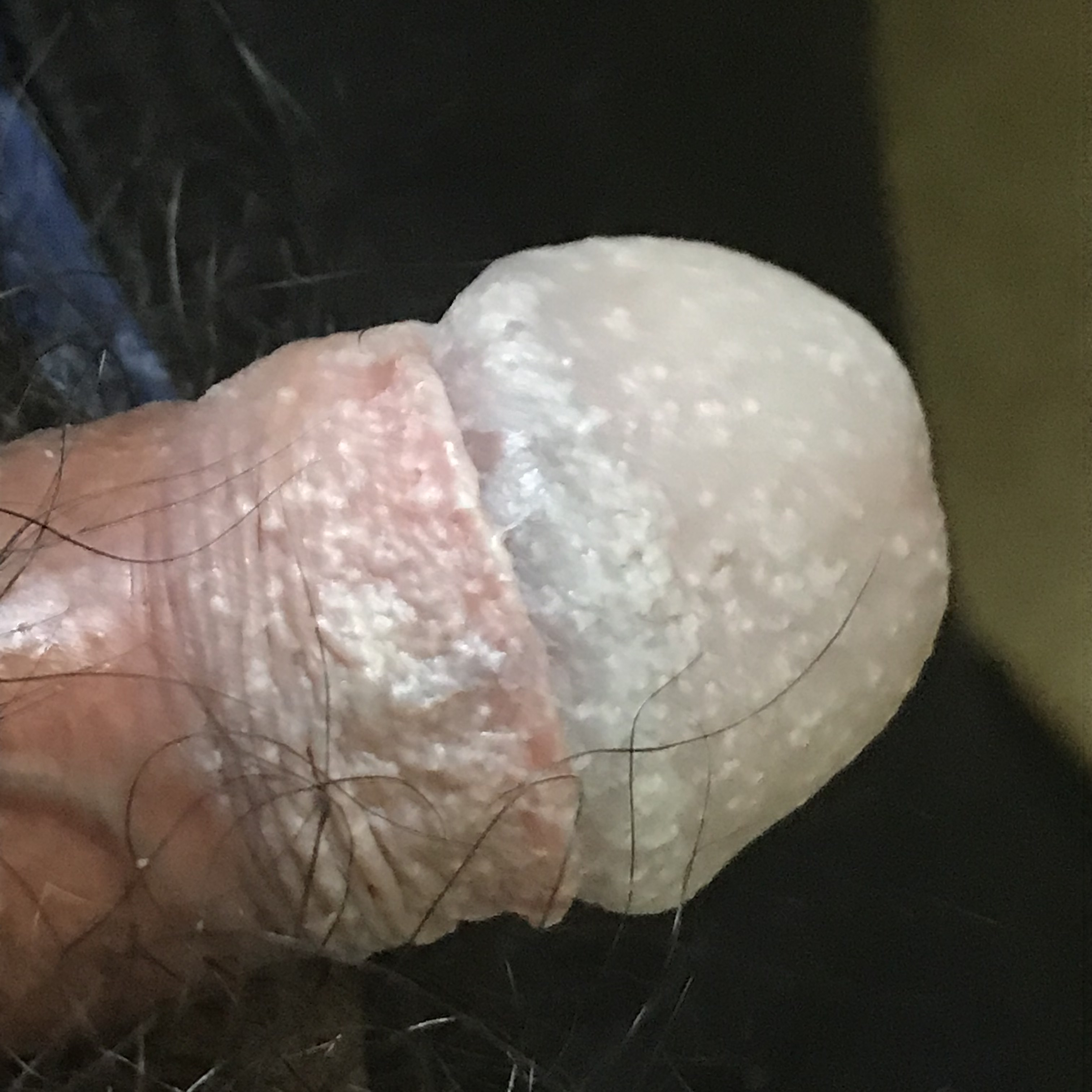 白い恥垢に覆われたペニスの医学的見本